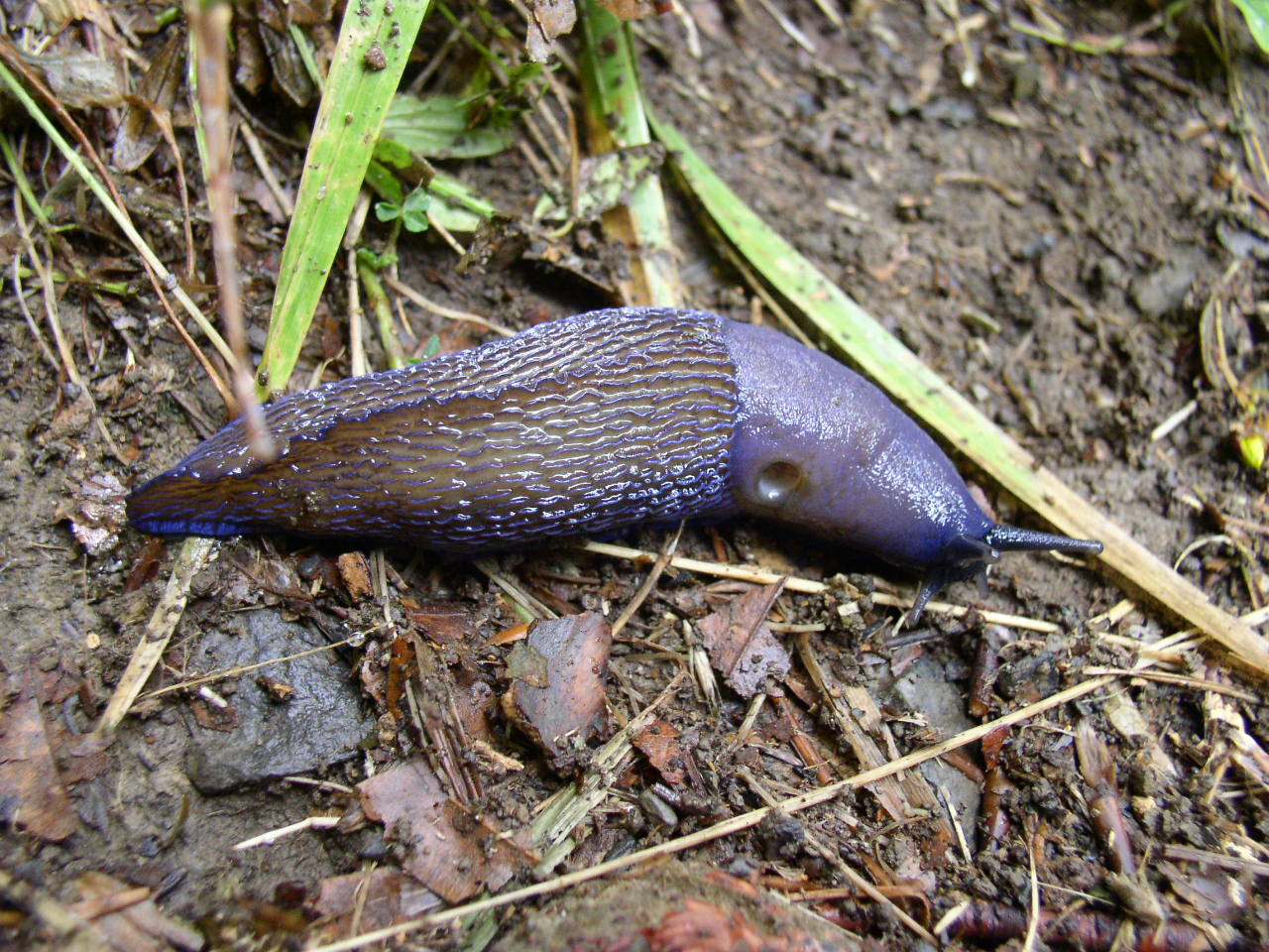 Species Bielzia coerulans